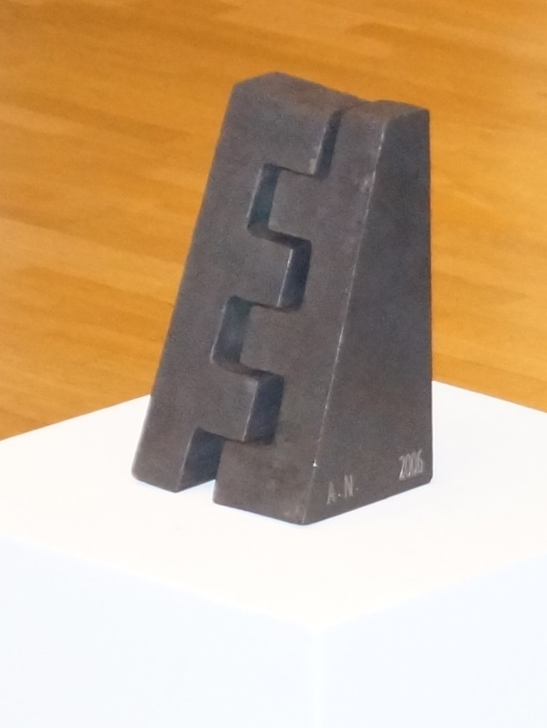 Die Preisträger erhalten die zweiteilige Stahlskulptur von Ansgar Nierhoff mit dem Namen: formen (2006)